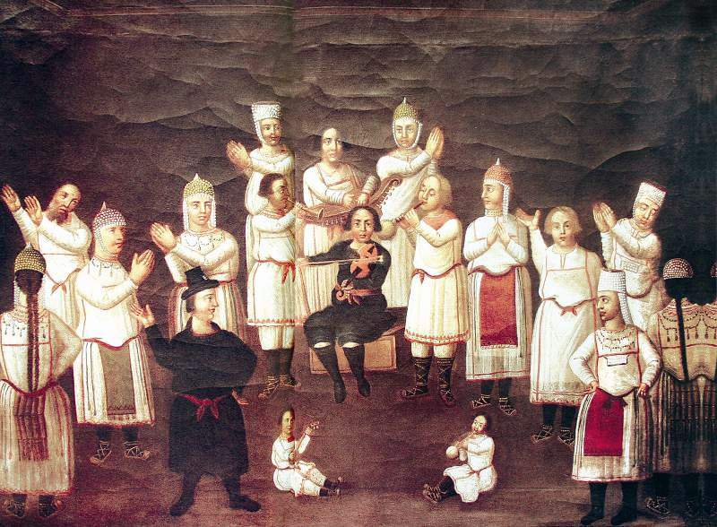 Чувашский праздник1